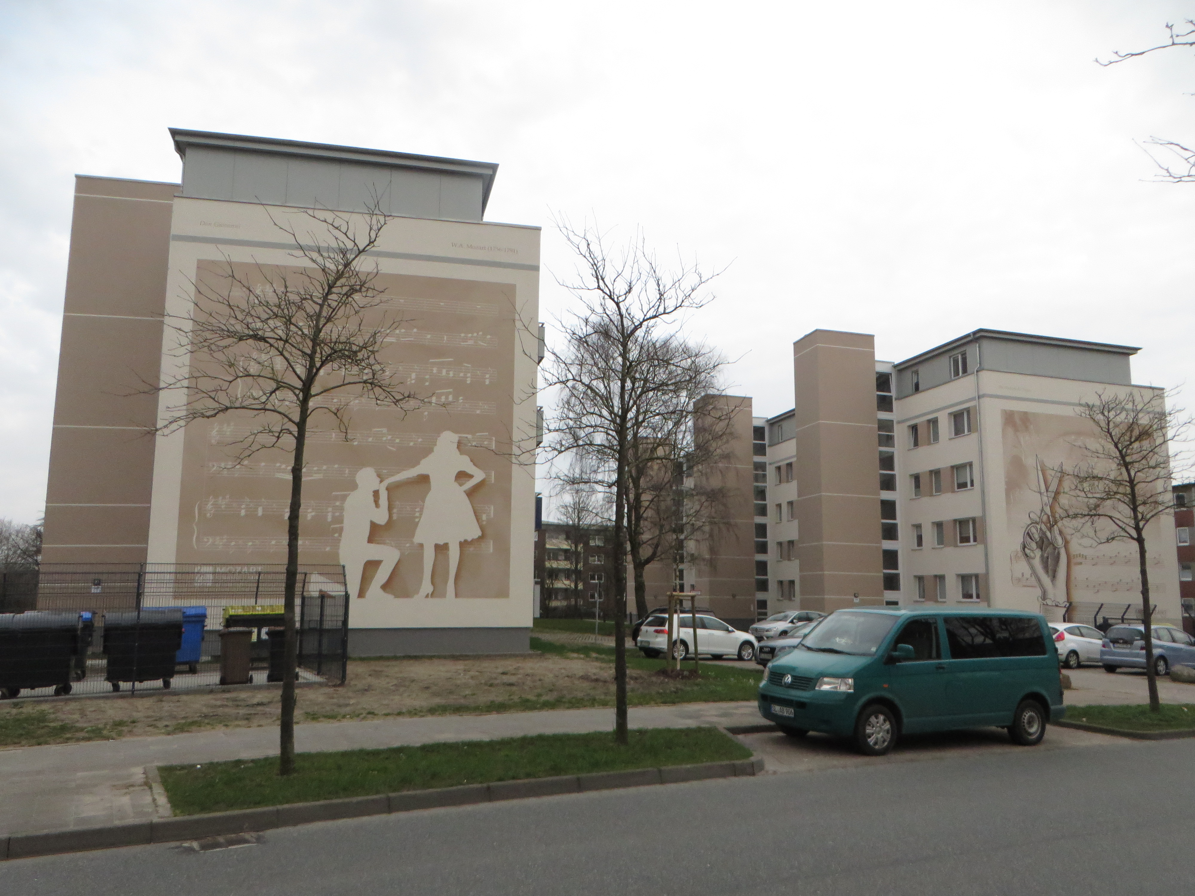 Außenwandbemalungen in der Mozartstraße (September 2018), Bild 02